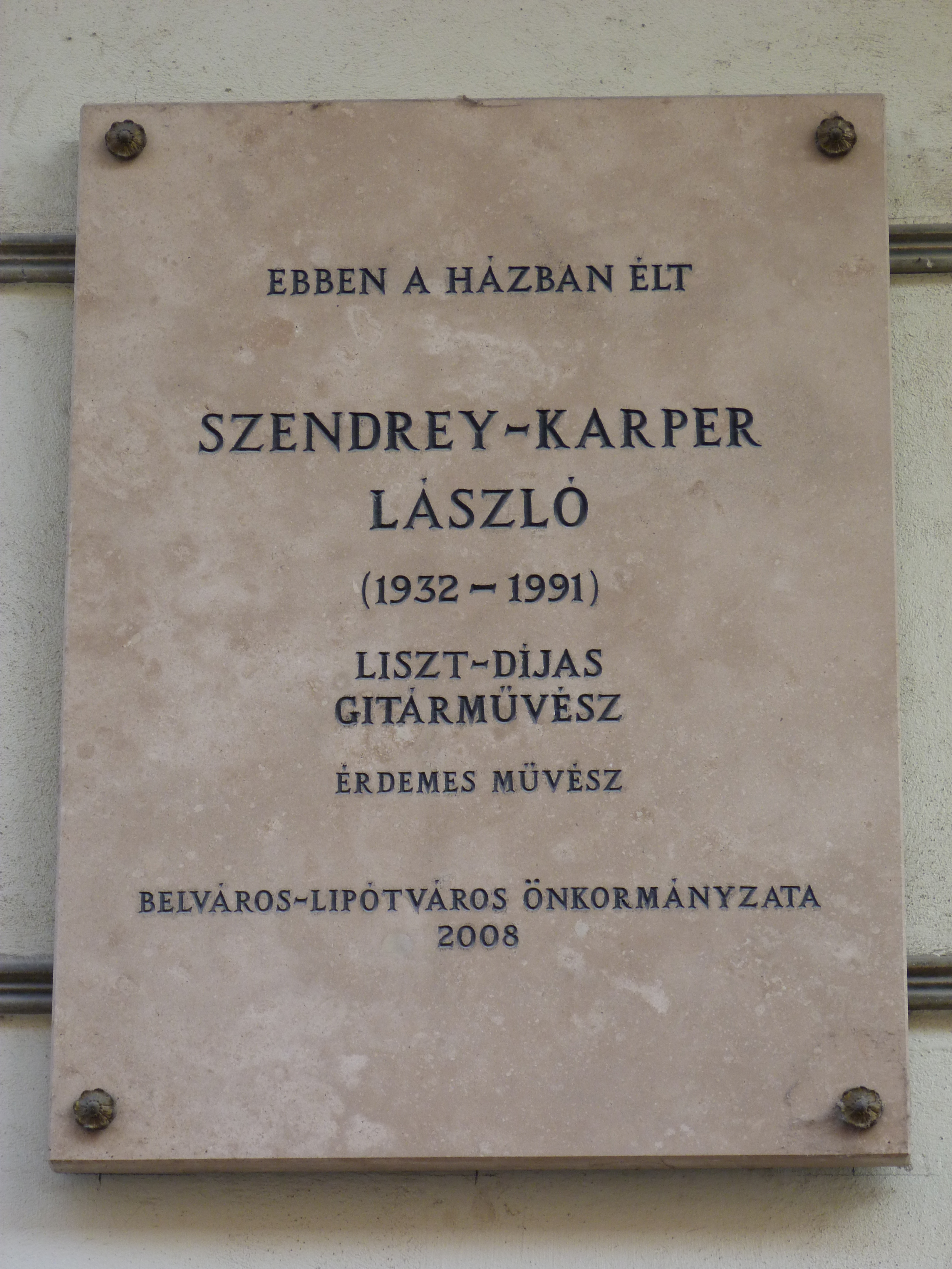 A felvétel 2013. december 21 -én készült Budapest Belvárosában. Szendrey-Karper László emléktáblája.